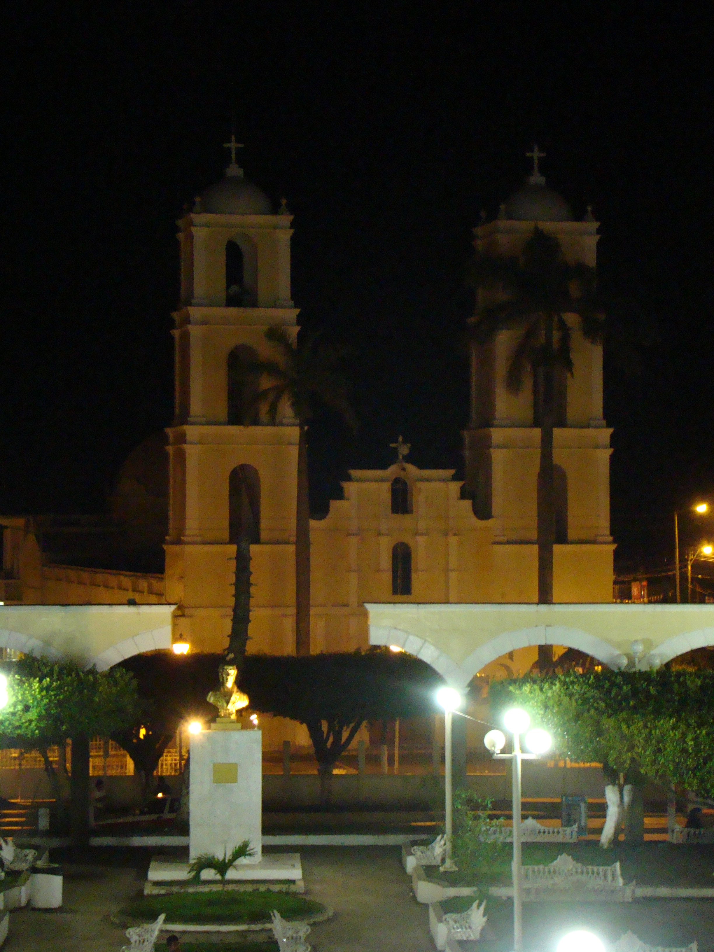 Cosoleacaque, Ver.